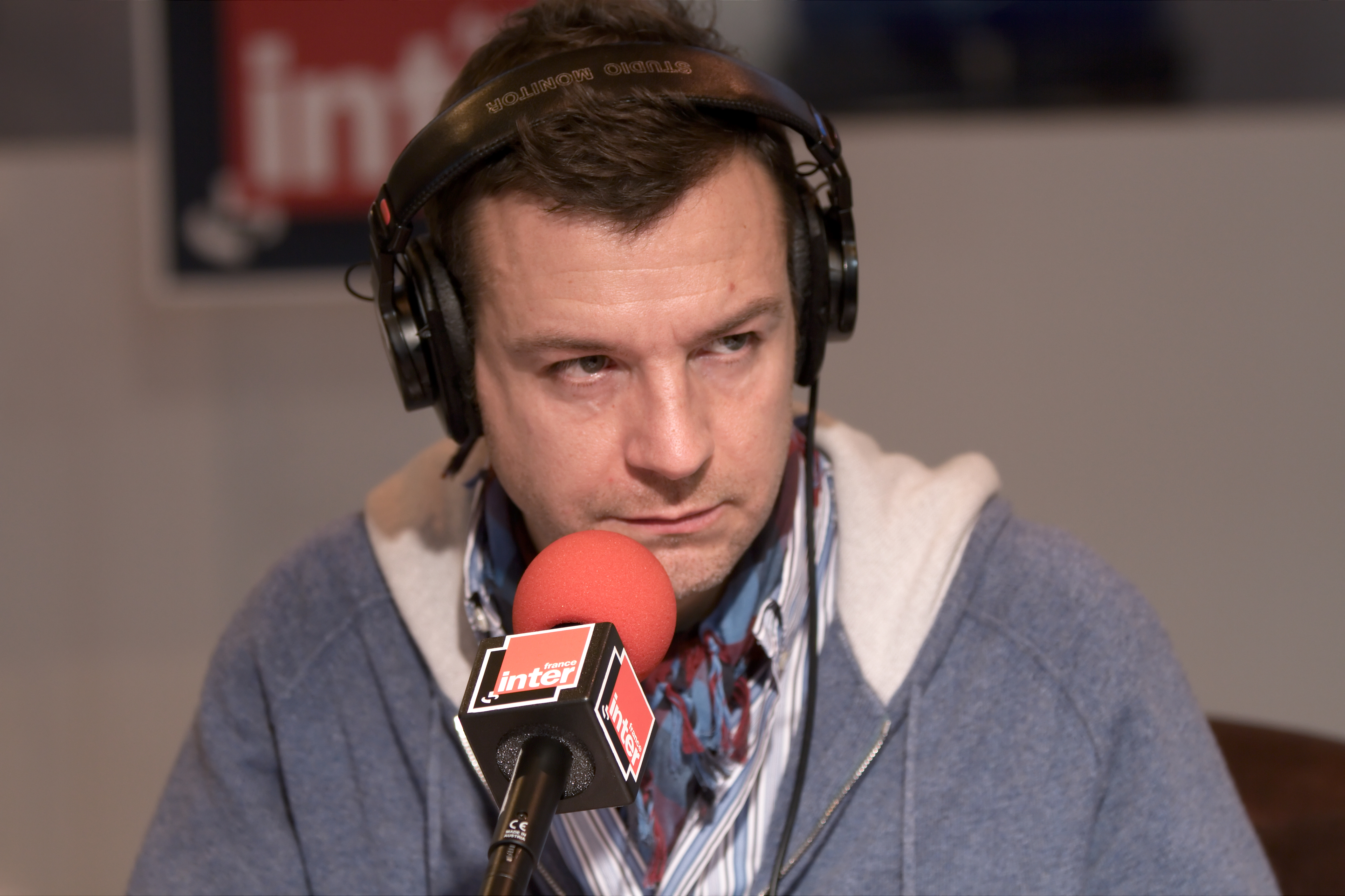 L'animateur radio Mathieu Vidard en direct du Salon du livre de Paris pour son émission La Tête au carré.